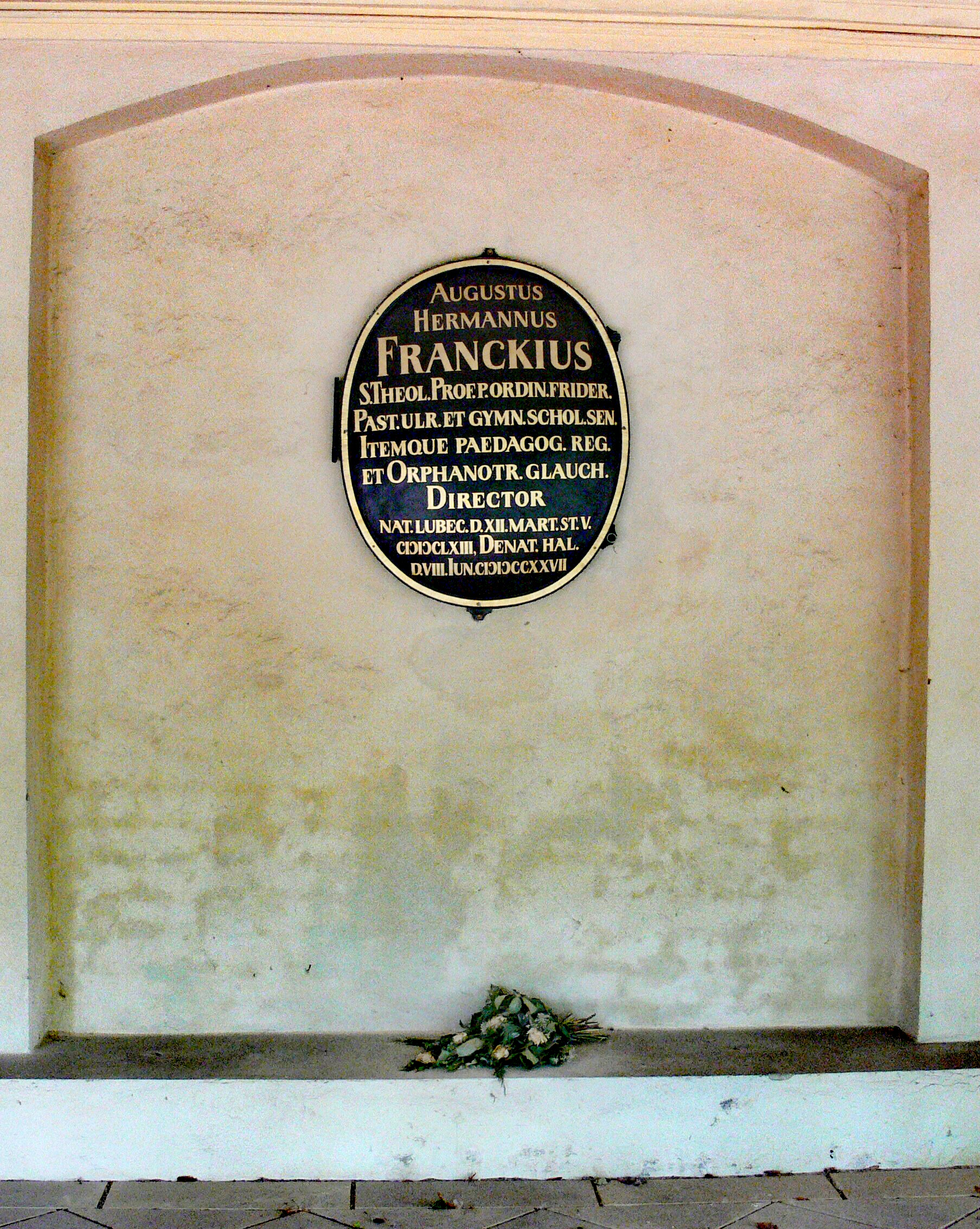 Stadtgottesacker, Halle an der Saale. Grab August Hermann Francke.